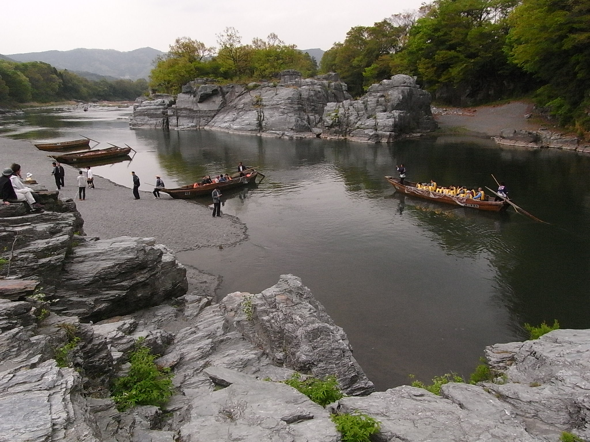 秩父郡 長瀞